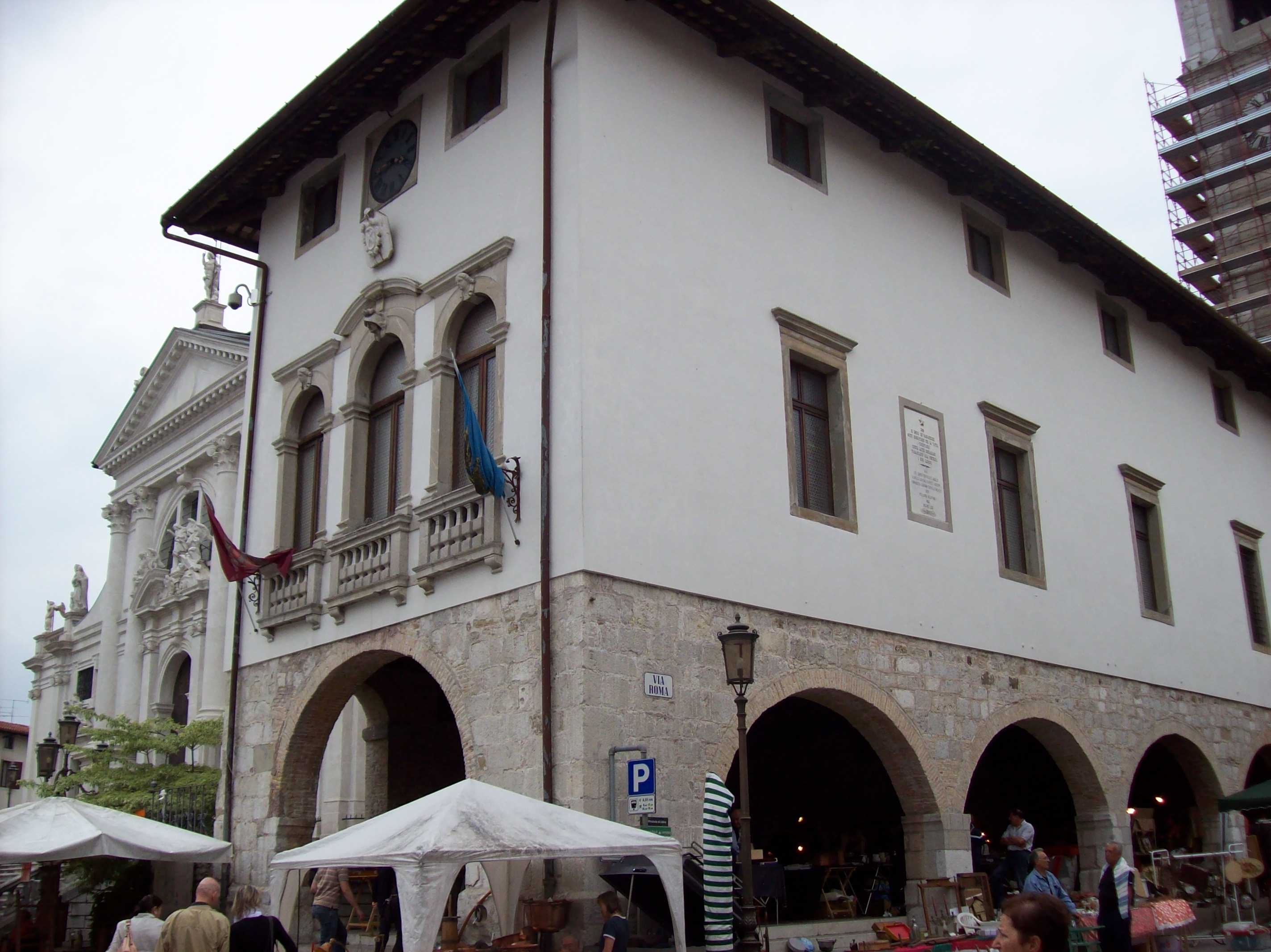 San Daniele del Friuli (UD-Italy), l'antico Palazzo Comunale